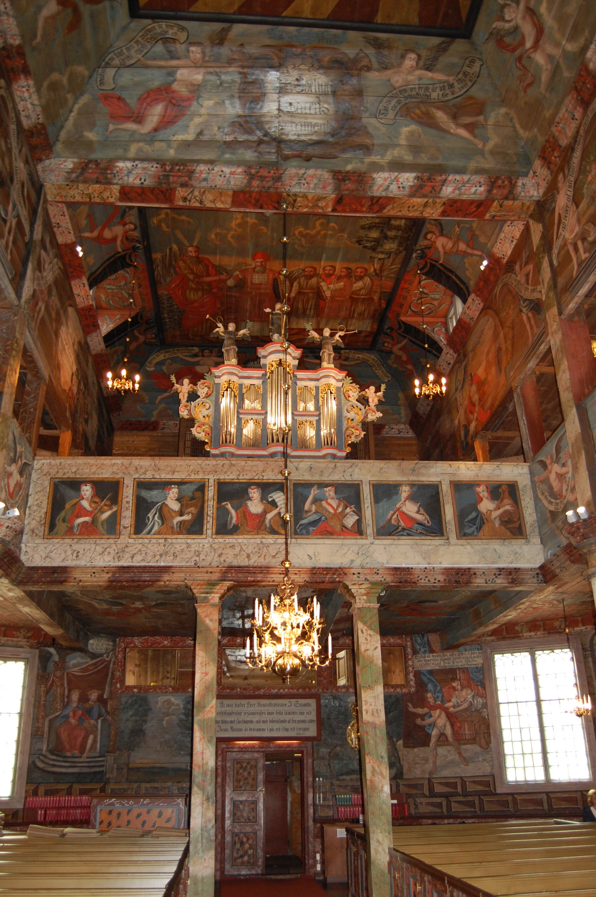 Orgelempore in der Kirche von Habo